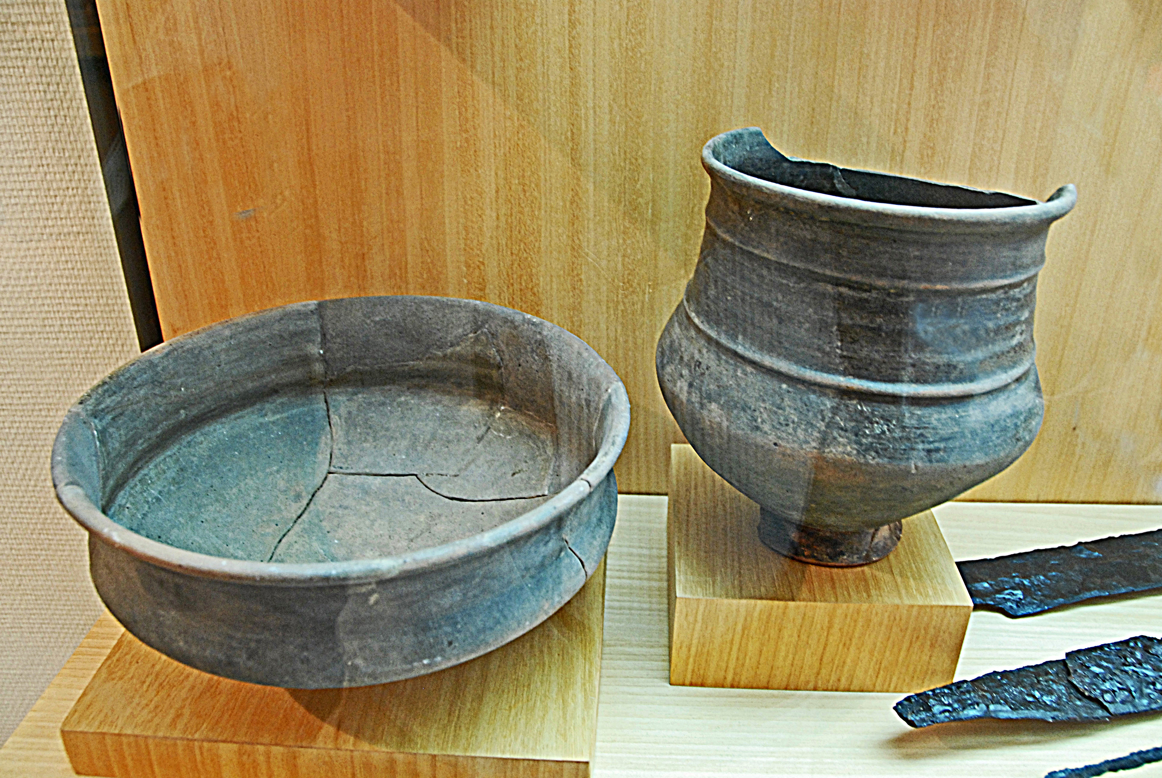 Civaux, Museum, Keramikgefäße, Graphitglasur